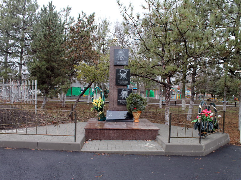 Стела, посвящённая Героям Советского Союза - уроженцам Весёловского района Ростовской области